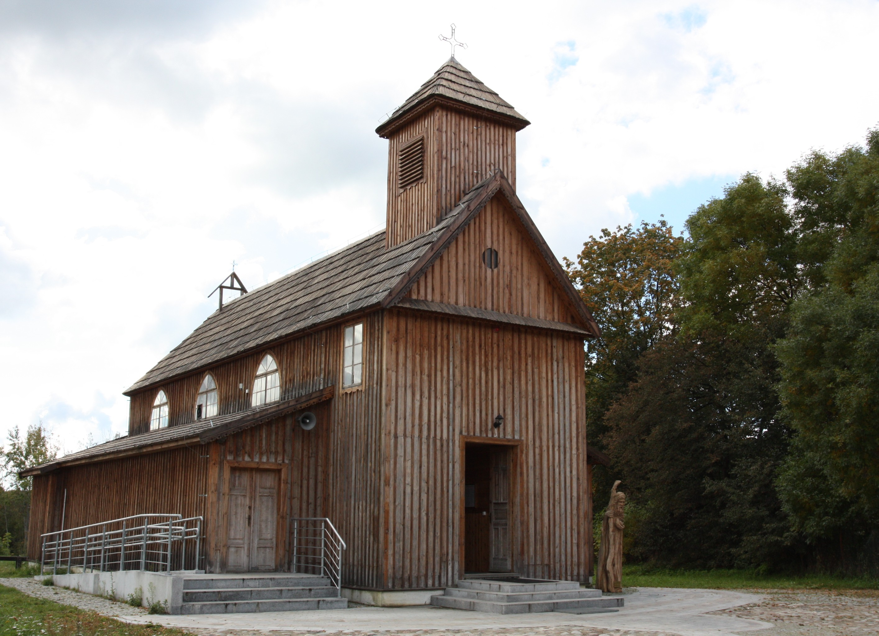 Łochów, kościół par. pw. św. Stanisława Kostki (ob. Miłosierdzia Bożego), 1932 (przeniesiony w 2010 r. z Wólki Dobryńskiej gm. Zalesie pow. bialski woj. lubelskie)